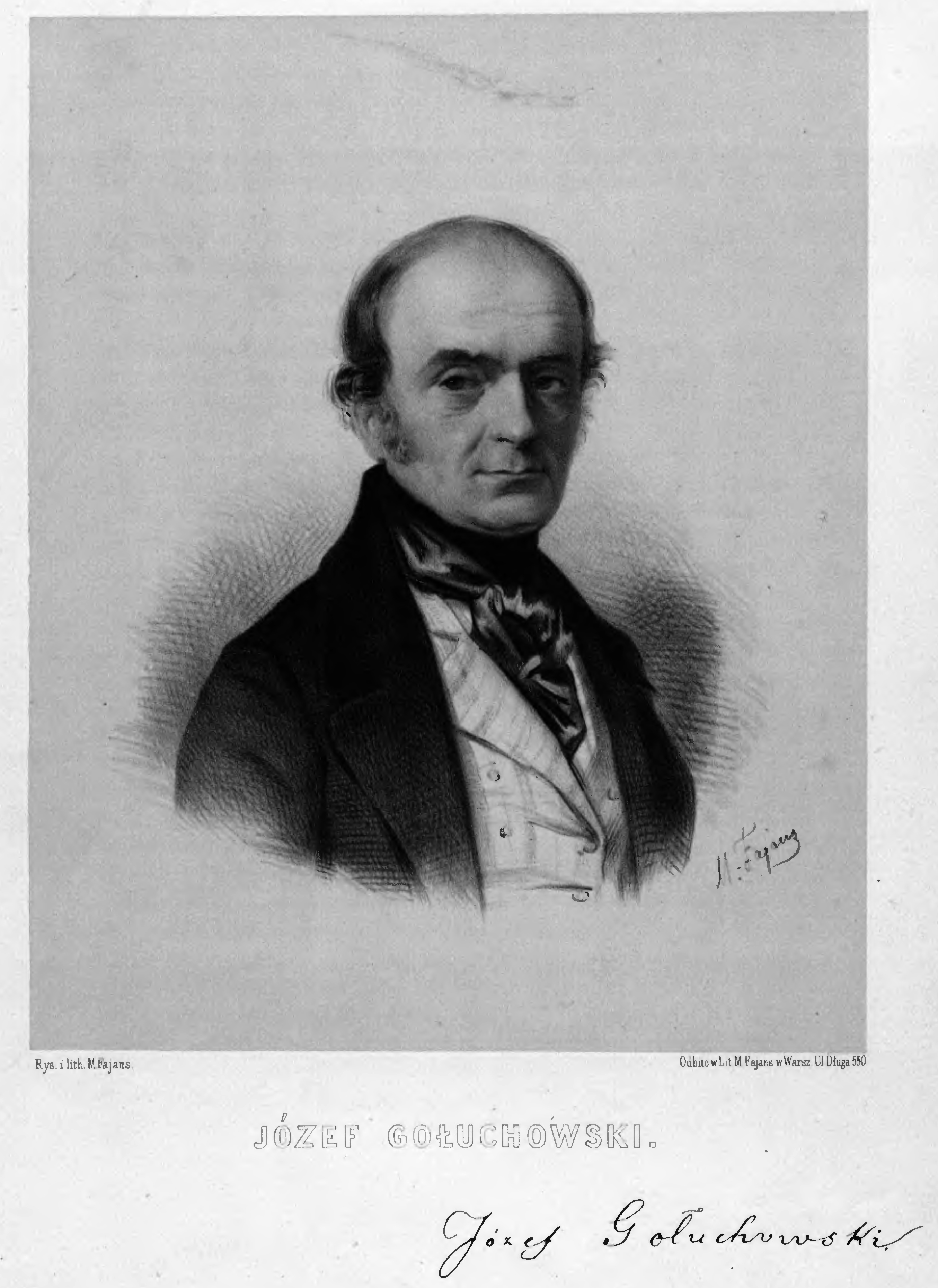 Portrait of Józef Gołuchowski - litography